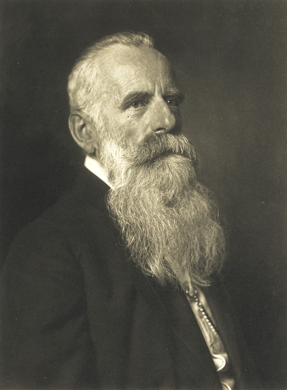 Portraitfoto des Politikers Arthur von Posadowsky-Wehner.